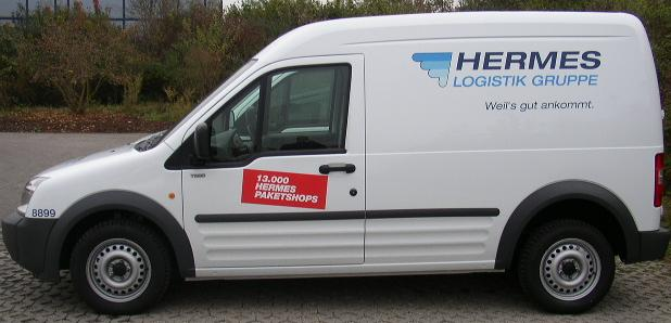 Zustellfahrzeug der HLG